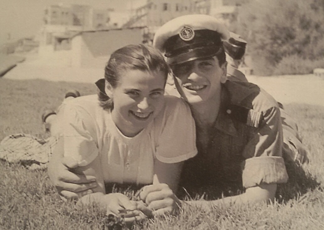 שפיר עם רות גרוטו בתקופת החיזור